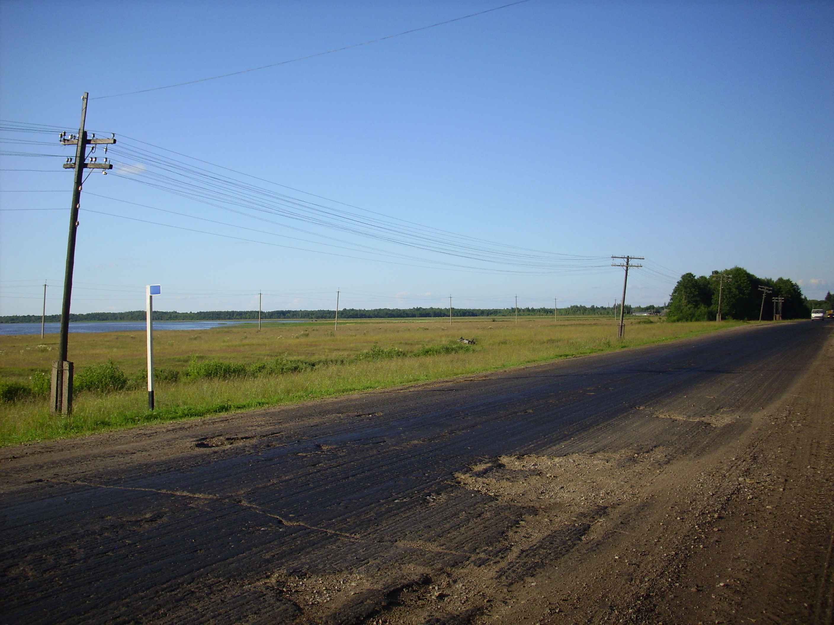 Усвяты